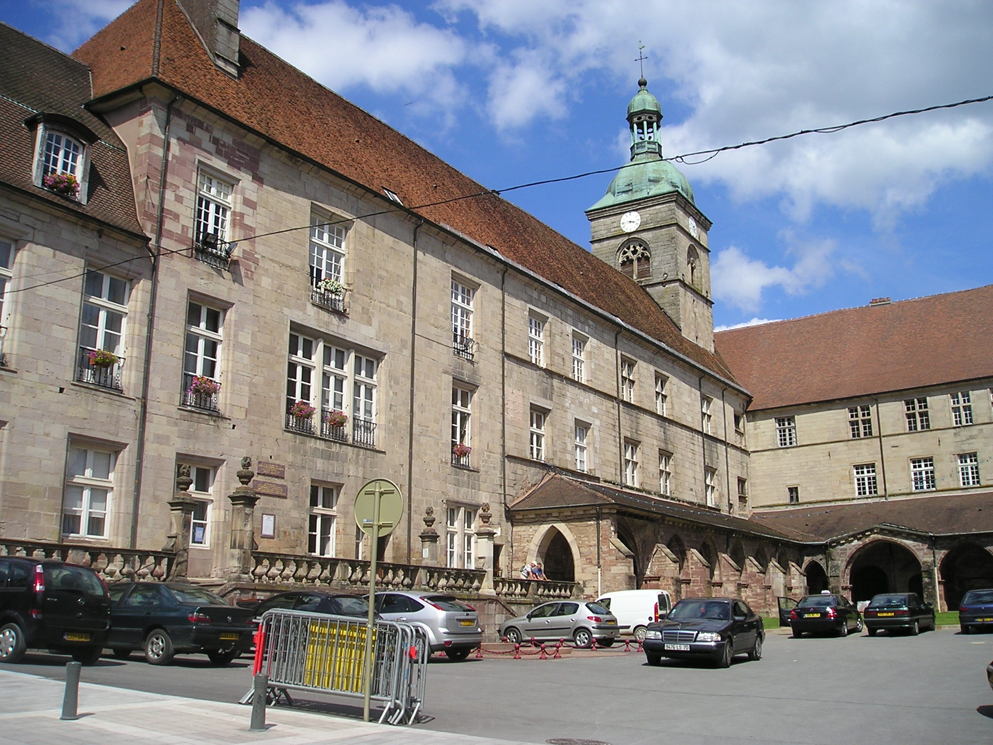 Luxeuil-les-Bains,_Kreuzgang_an_der_ehemaligen_Klosterkirche St-Colomban